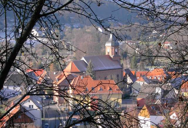 Weibacher Kirche vom Panoramaweg aus fotografiert